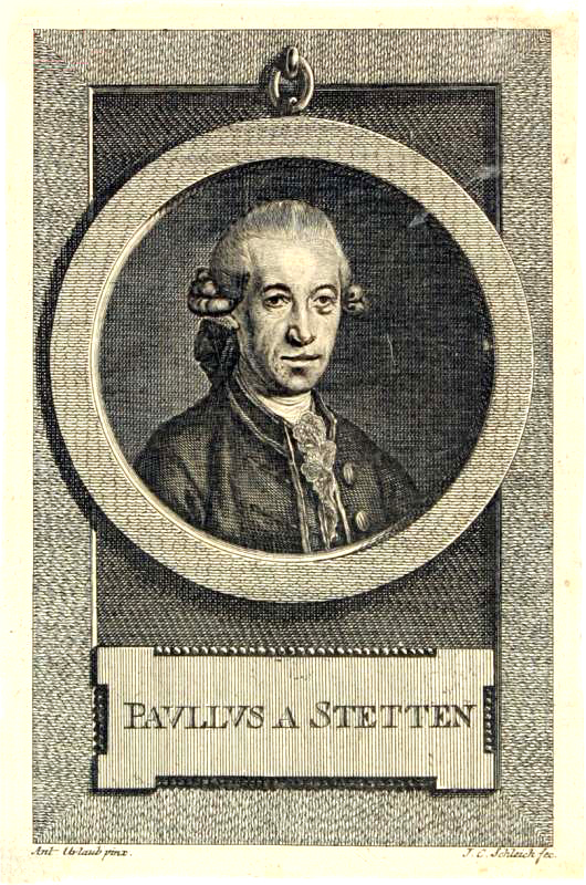 Johann Carl Schleich - Porträt Paul von Stetten des Jüngeren nach Anton Urlaub 1787